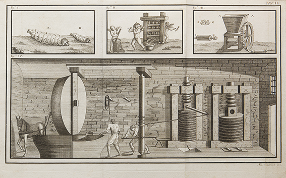 Tavola III incisa su rame (da Niccolò Cesarano) che mostra macchinari per l'estrazione dell'olio di oliva. Trattato di Giovanni Presta - Degli ulivi delle ulive, e della maniera di cavar l'olio, Stamperia Reale, Napoli,1794